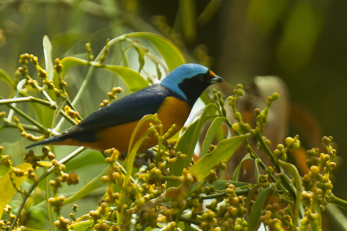 Elegant Euphonia - Panama_H8O1931